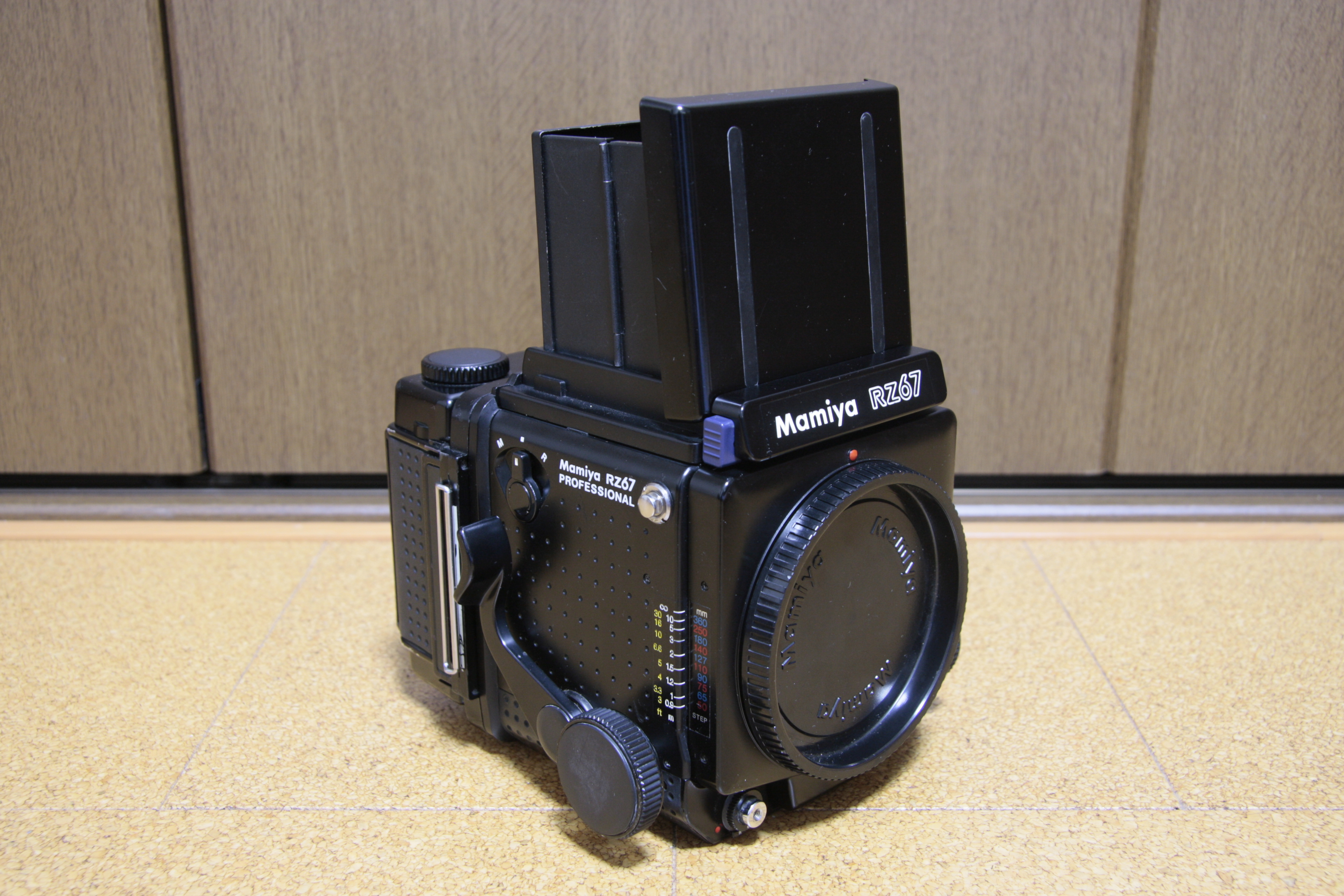 Mamiya RZ67 Professional 108000番台。ウエイトレベルファインダー付き